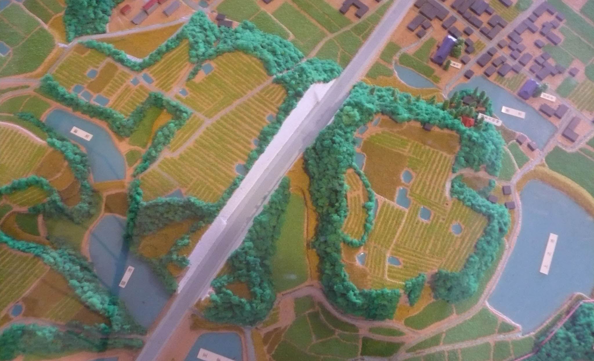 神戸市玉津土地区画整理事業区域の事業計画前の模型